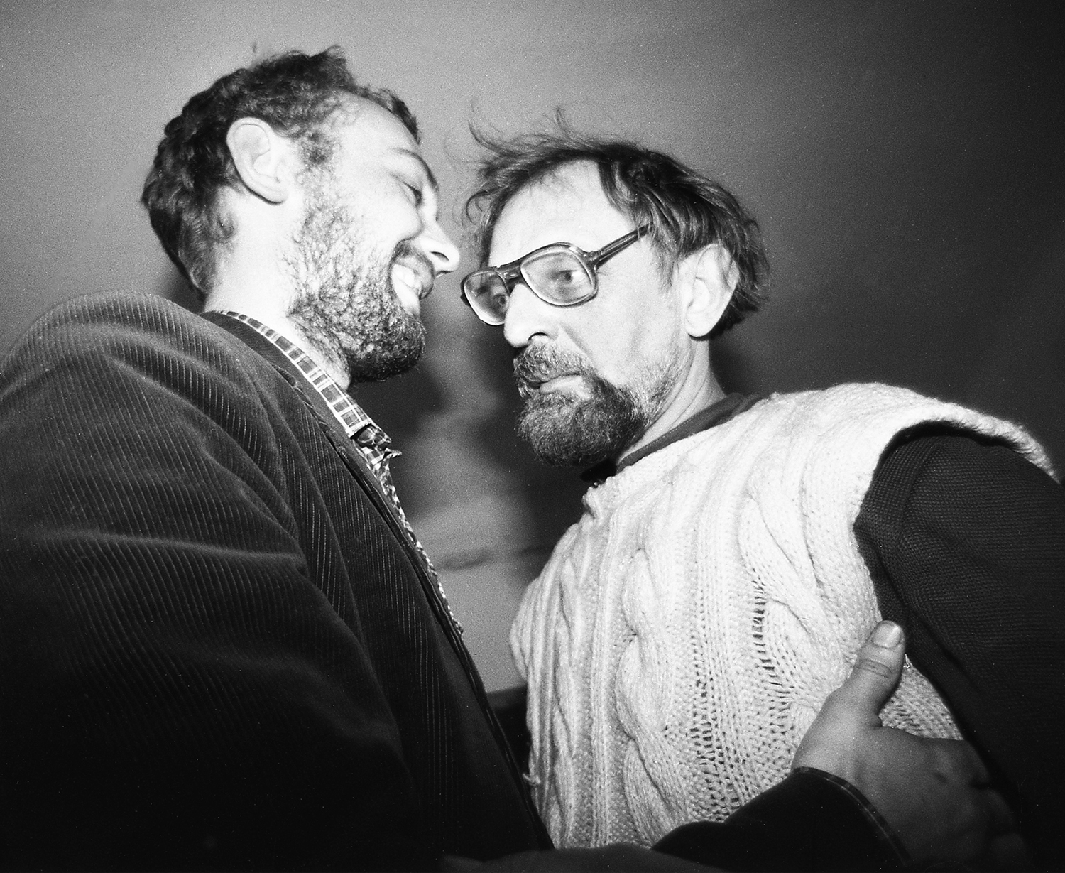 Jaan Toomik ja Jaan Paavle, kunstnikud 90